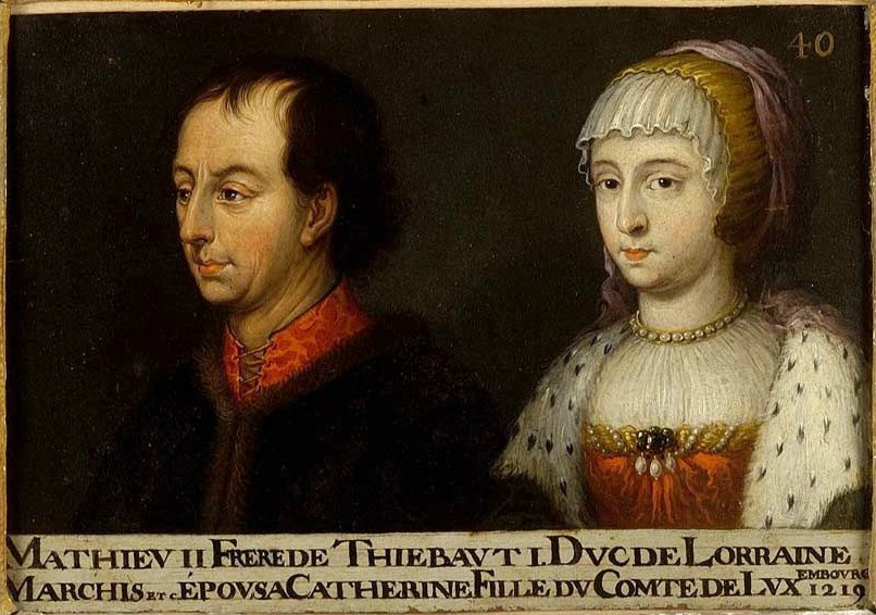 Portrait de Mathieu II, duc de Lorraine de 1220 à 1251, et de son épouse Catherine de Limbourg. Ce tableau fait partie d'une suite d'une soixantaine de double-portraits représentant les ducs et duchesses de Lorraine ainsi que leurs ancêtres supposés. Musée des Offices, Florence (Inv. 1890, 621)